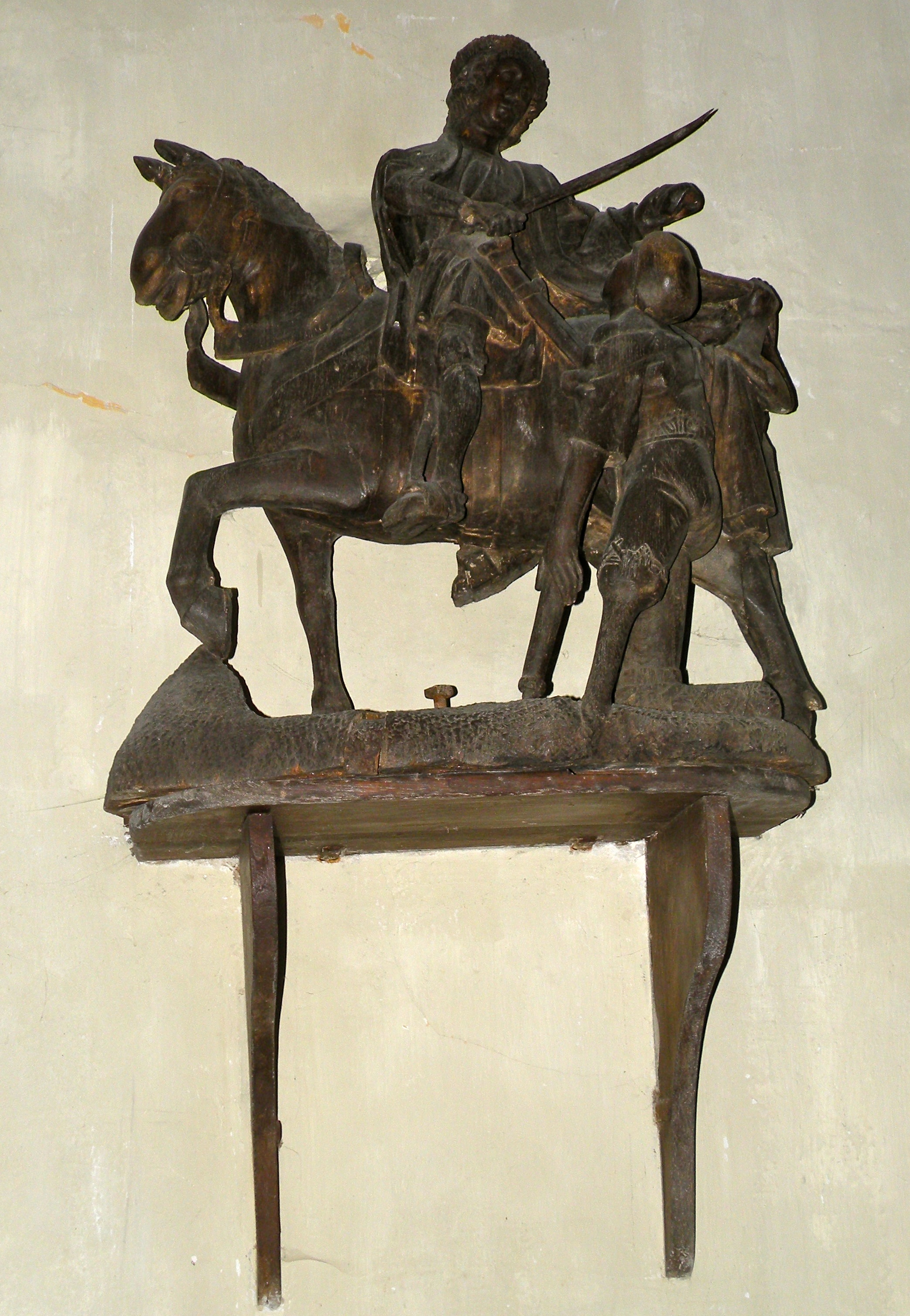 Intérieur de l'église Saint-Martin de Frouville statue de saint martin